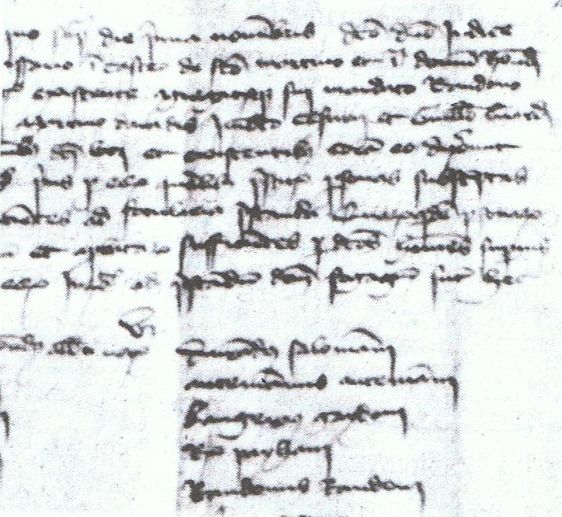 Extrait partiel de l'enquête de 1364 rédigée en latin médiéval et recensant les chefs de famille du Castrum de Saint-Martin dans le Val d'Entraunes (Comté de Provence)